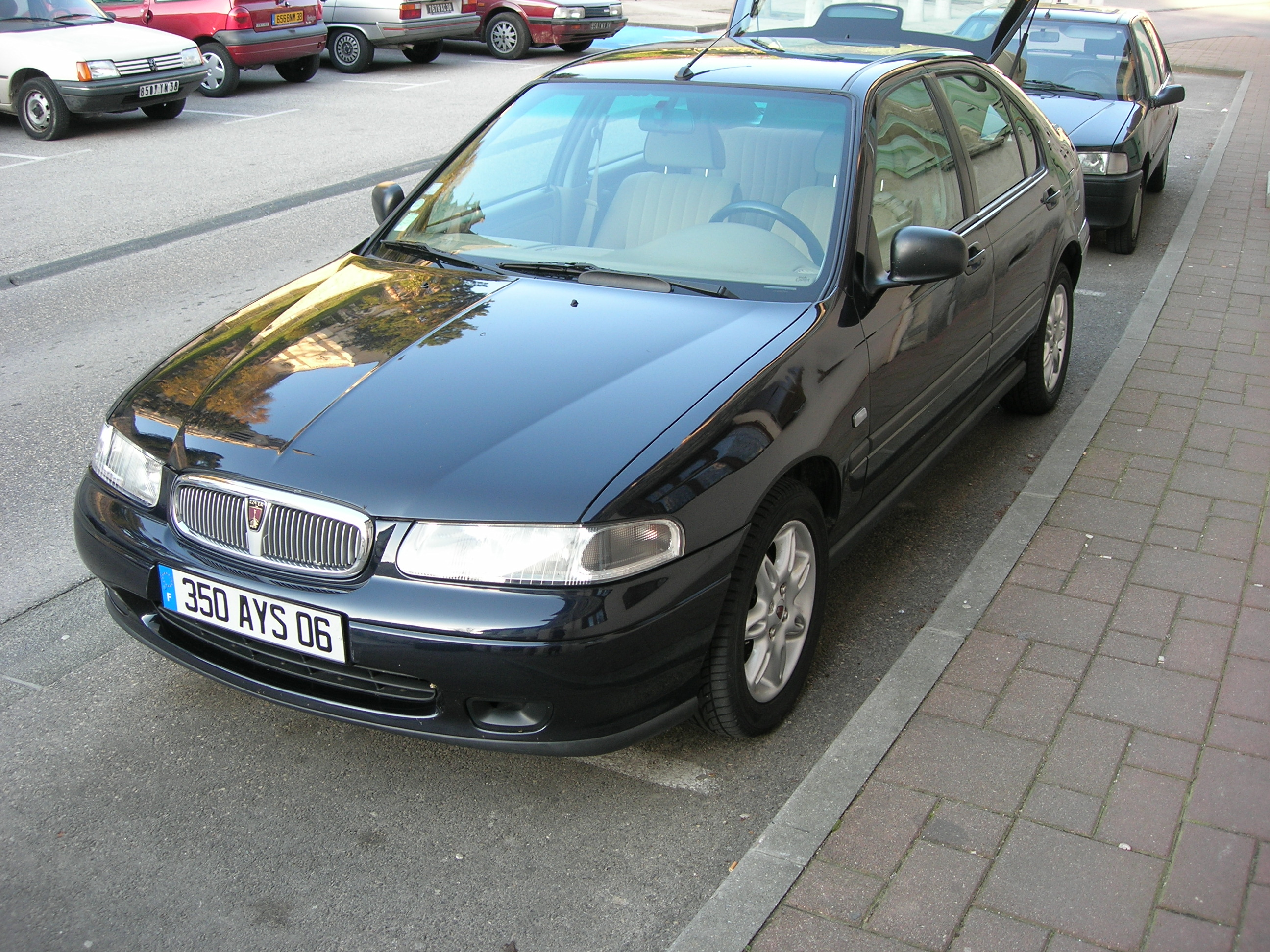 rover 420